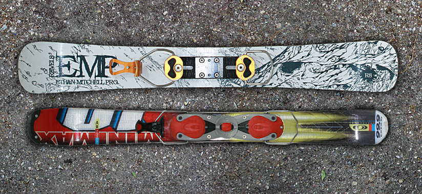 Сноублейды 99 рядом с Revel8 EMP 105